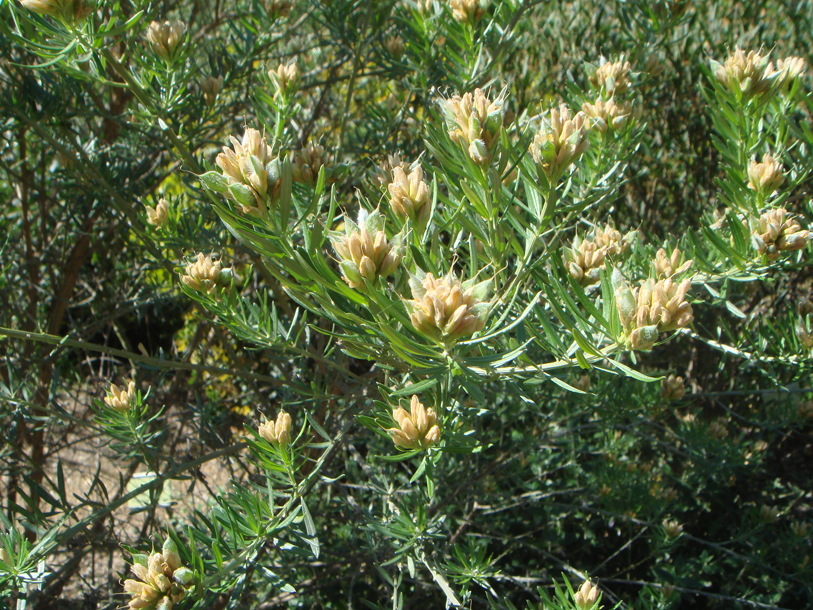 Teline linifolia syn. Genista linifolia. Jardín Botánico de San Fernando, Cádiz, España